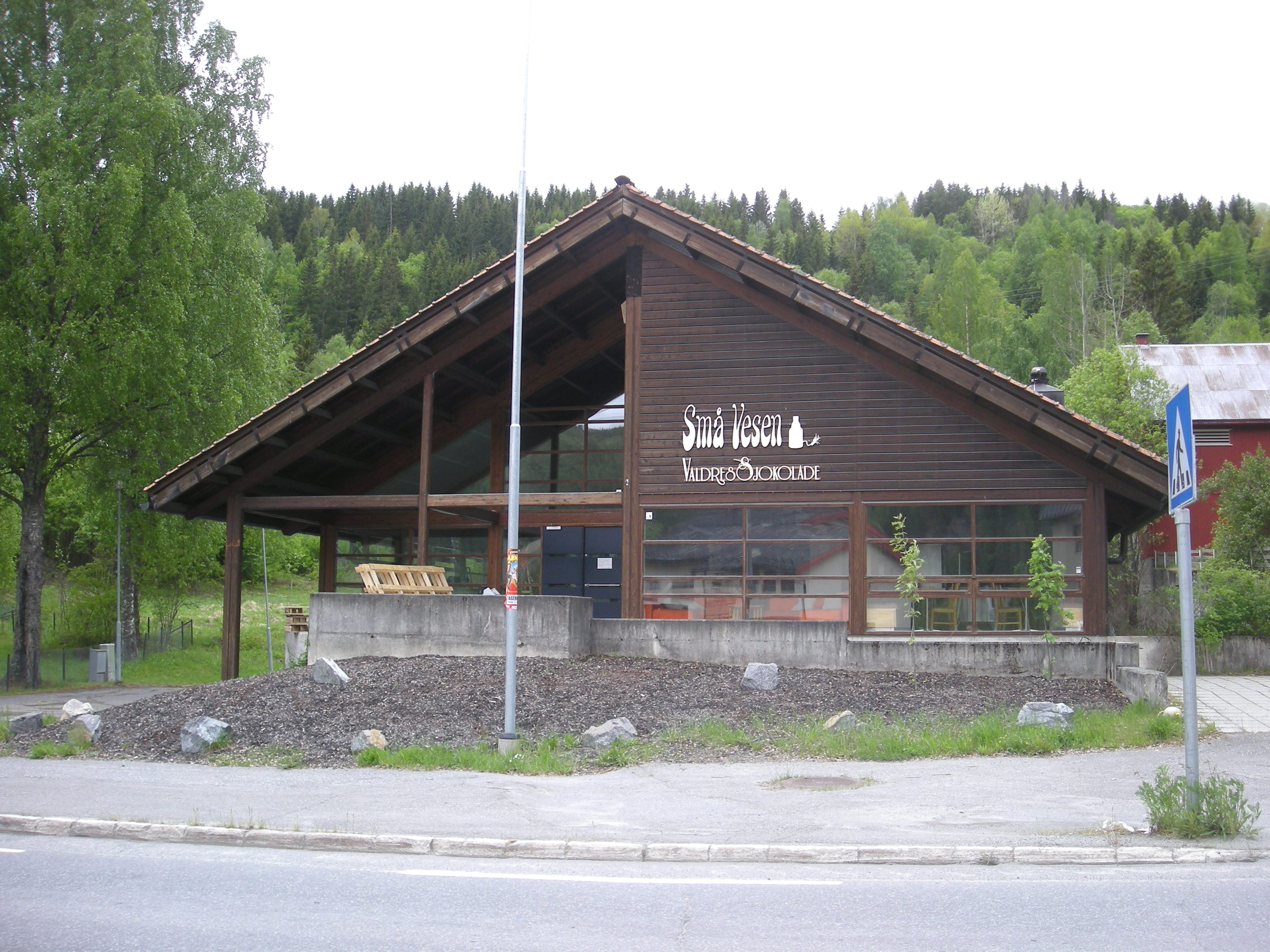 Fylkesvei 2450 (tidl. 222) går gjennom Bagn sentrum.